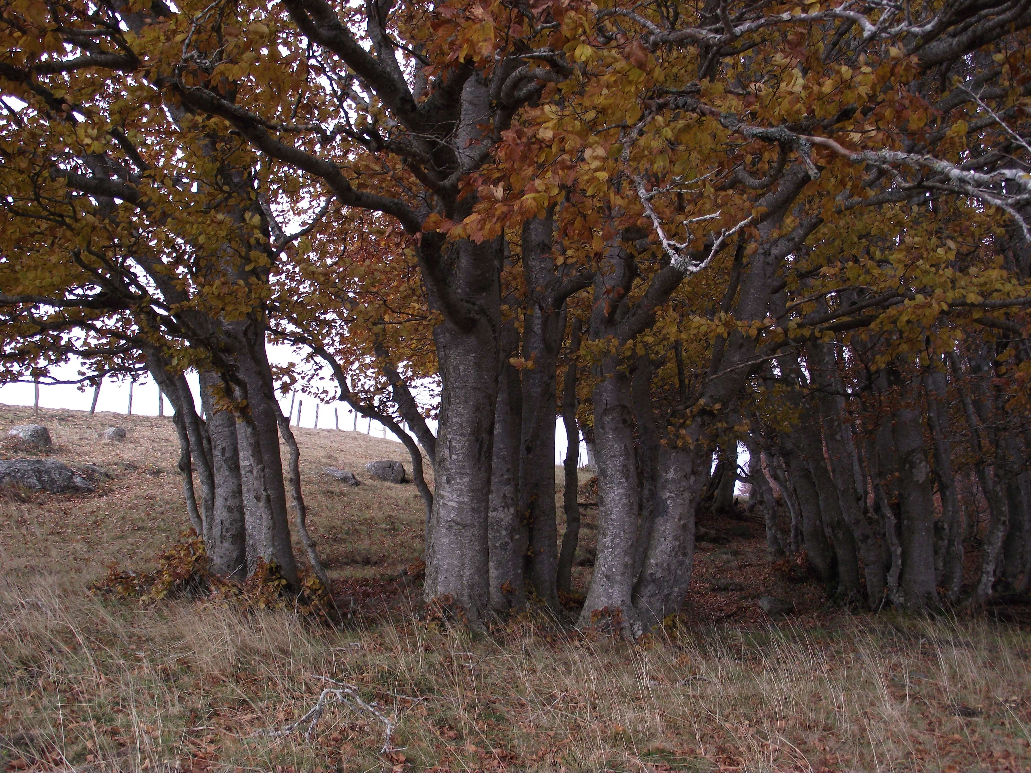 Hêtraie d'altitude (+ de 1300 m) dans les monts d'Aubrac (Massif central, France)